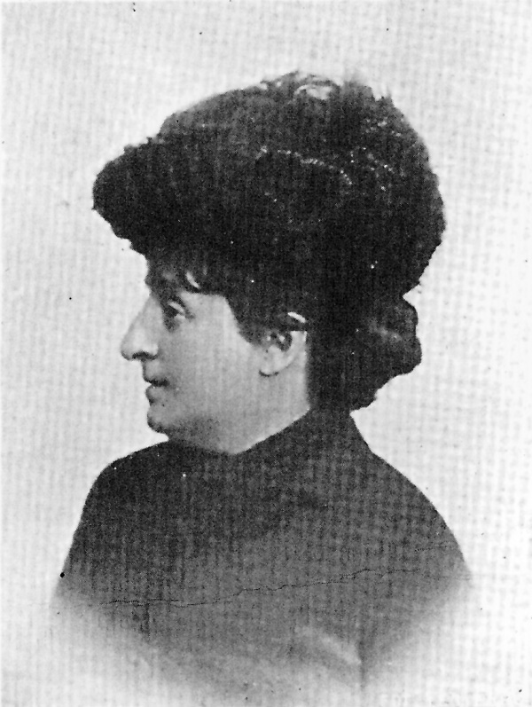 Emma Perodi - Provenienza